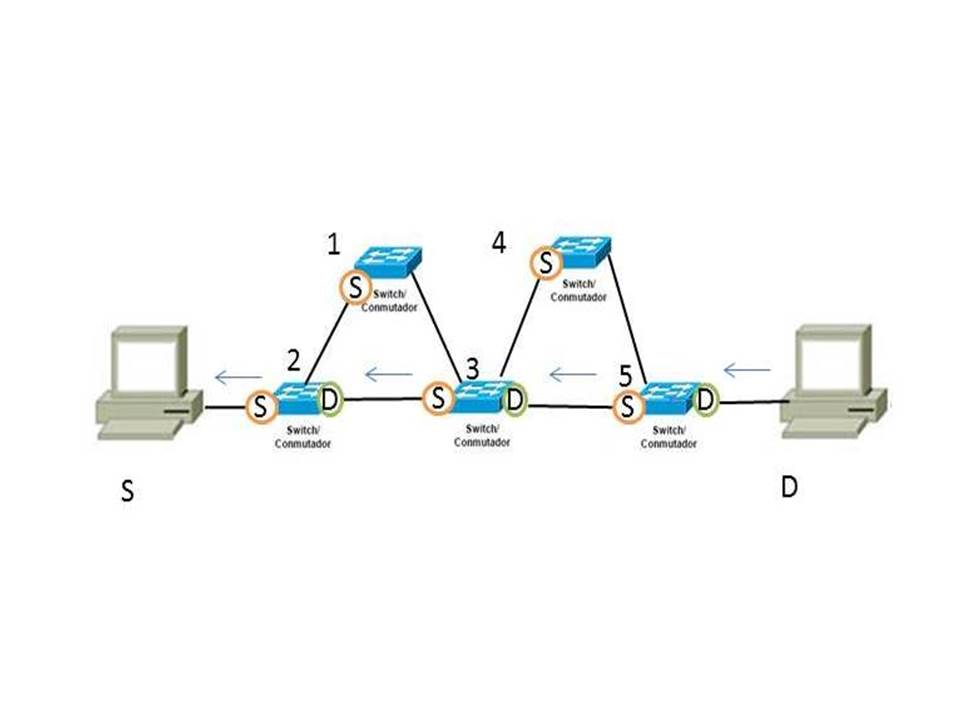 Arp Reply All-Path